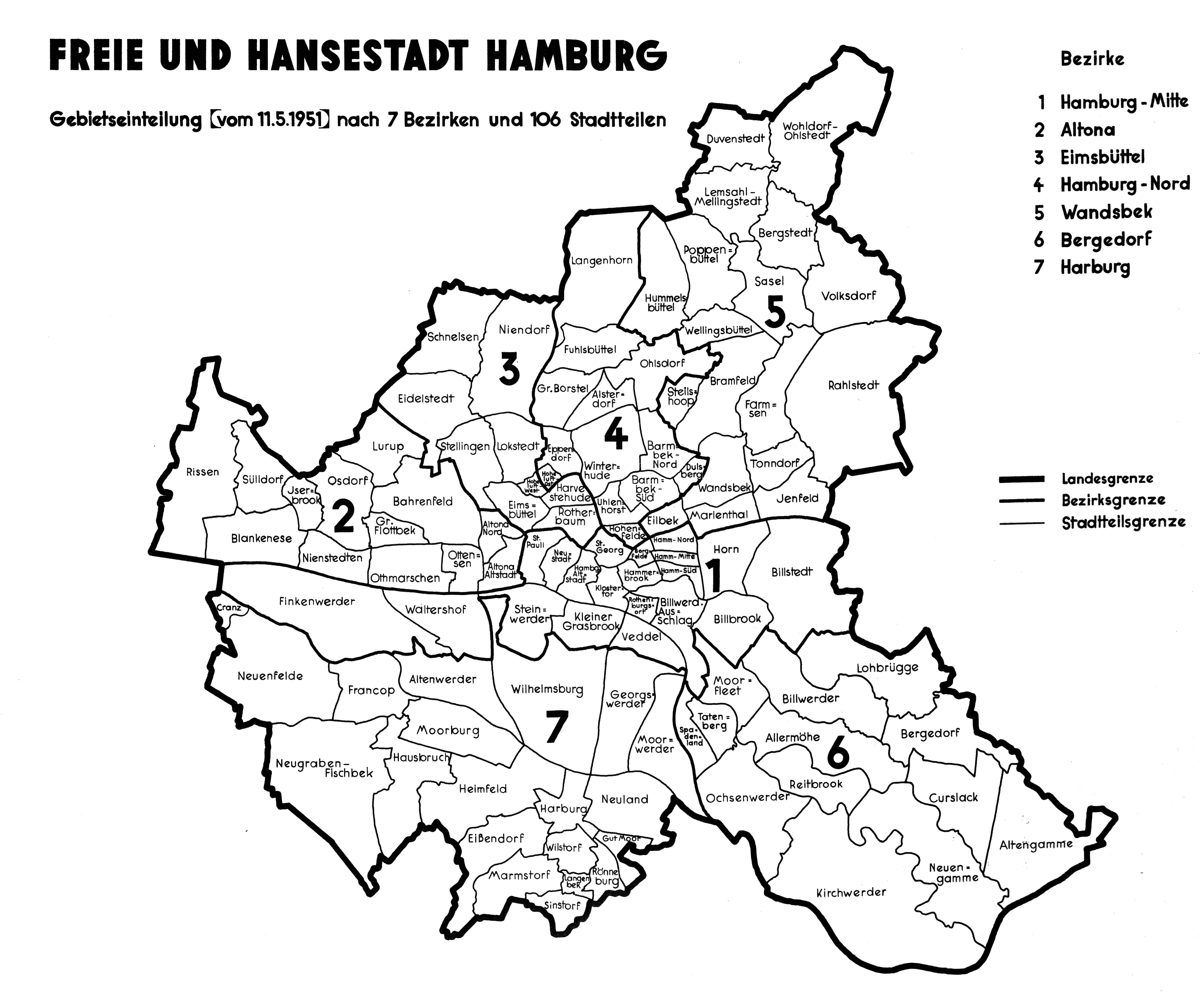 Freie und Hansestadt Hamburg Gebietseinteilung vom 11.5.1951 nach 7 Bezirken und 106 Stadtteilen